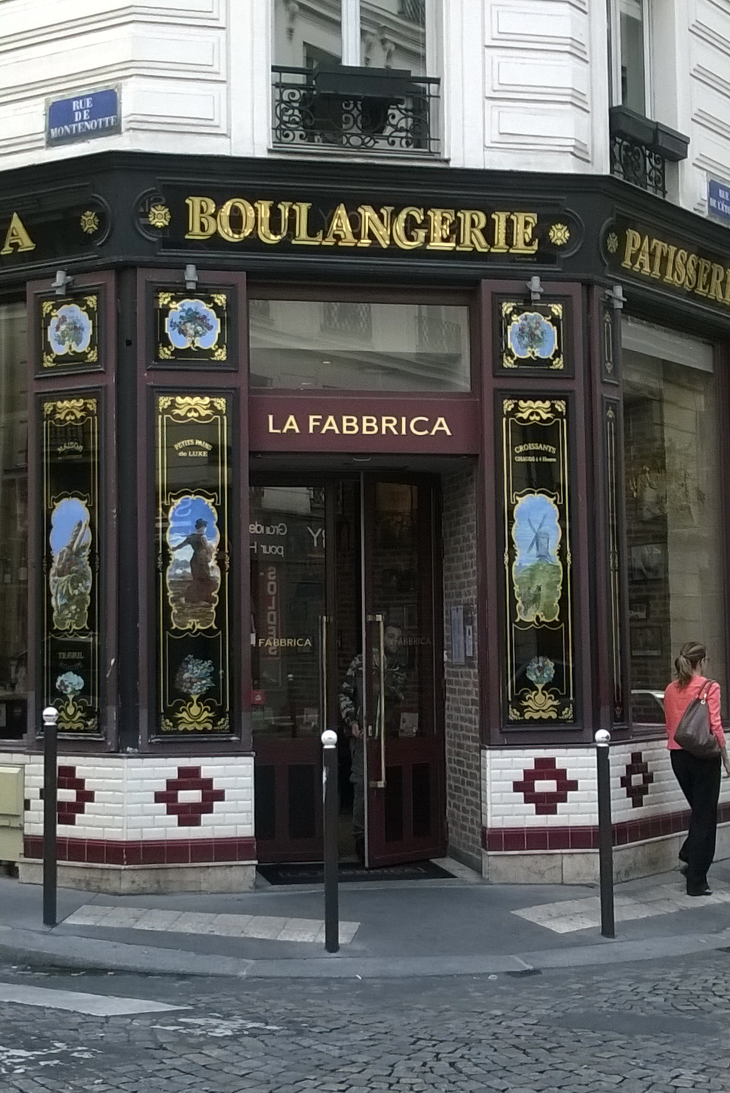 ancienne boulangerie rue de l'étoile Paris XVII